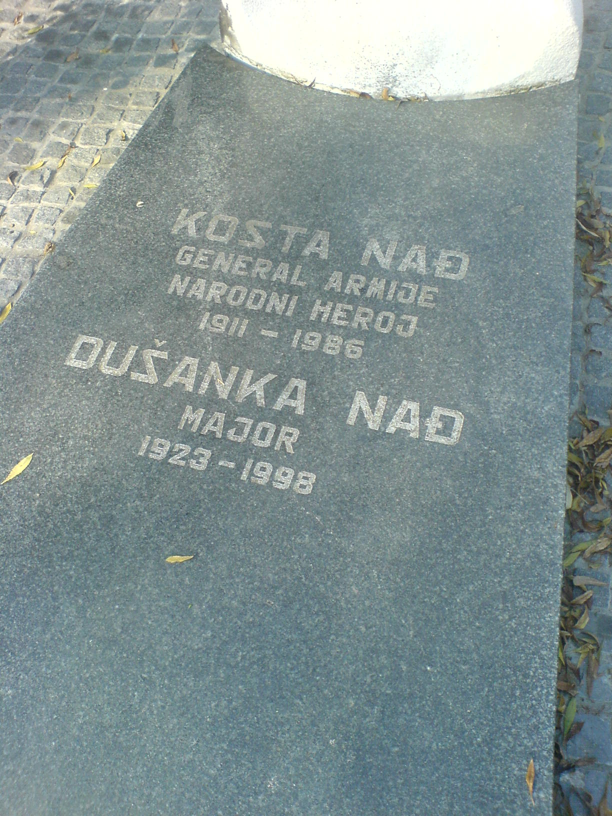 Tomb of Kosta Nadj at Novo groblje, Belgrade